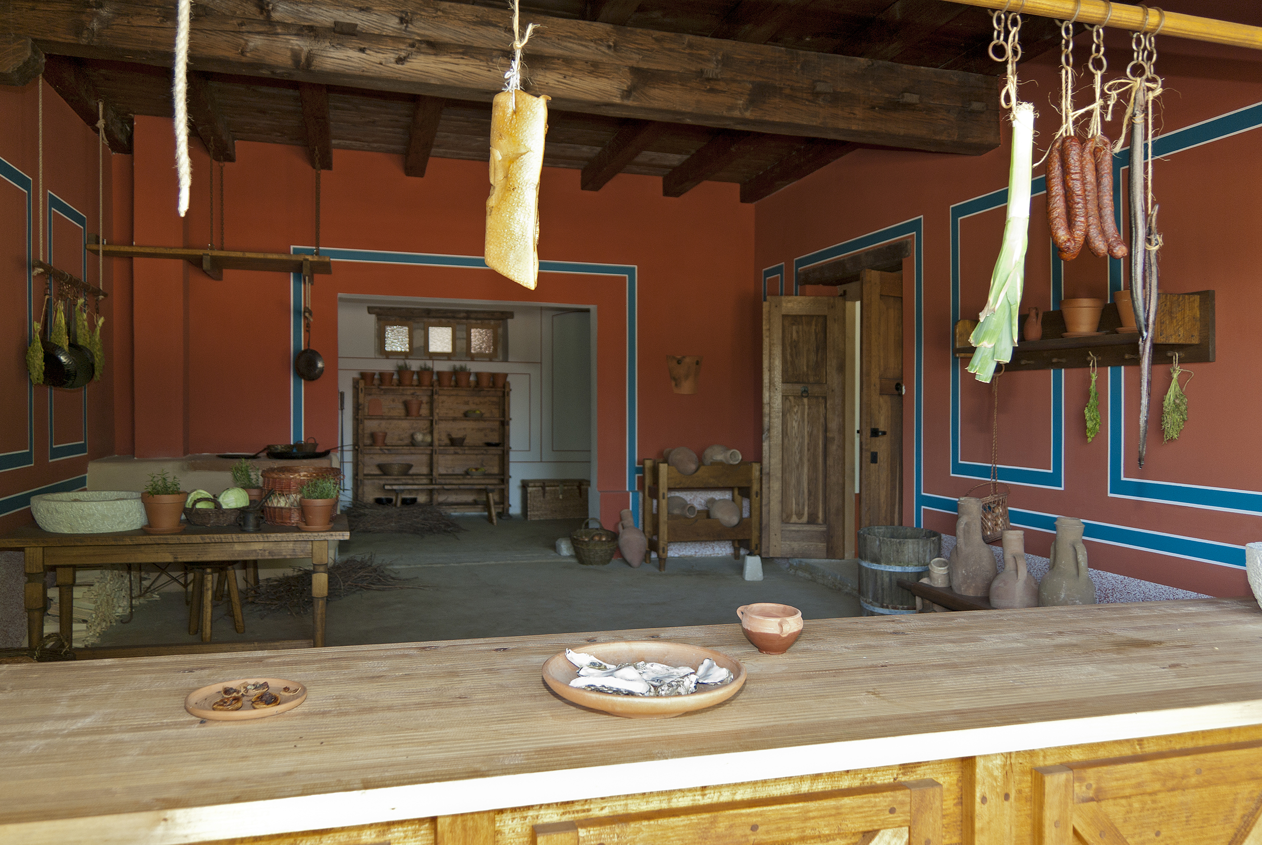 Carnuntum – Rekonstruktionen im Freilichtmuseum Thermopolium (Ein Gastrobetrieb, Imbissstube) Dieses Bild wurde anlässlich des österreichischen Tags des Denkmals 2014 in Niederösterreich eingereicht.